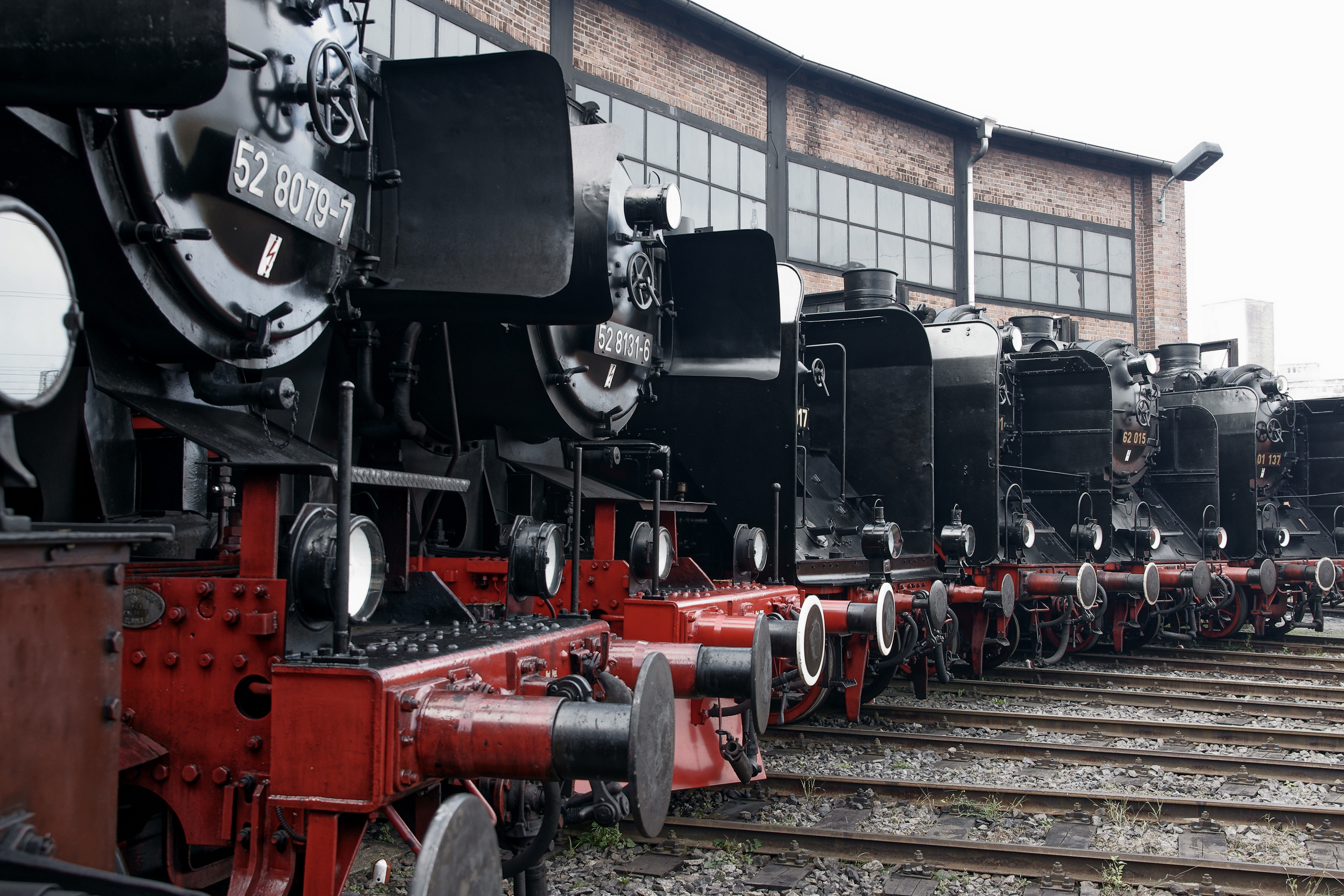 Im Eisenbahnmuseum in Dresden.